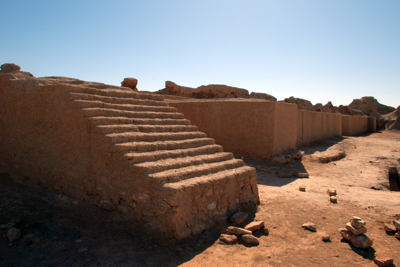 دير الزور سور مملكة ماري